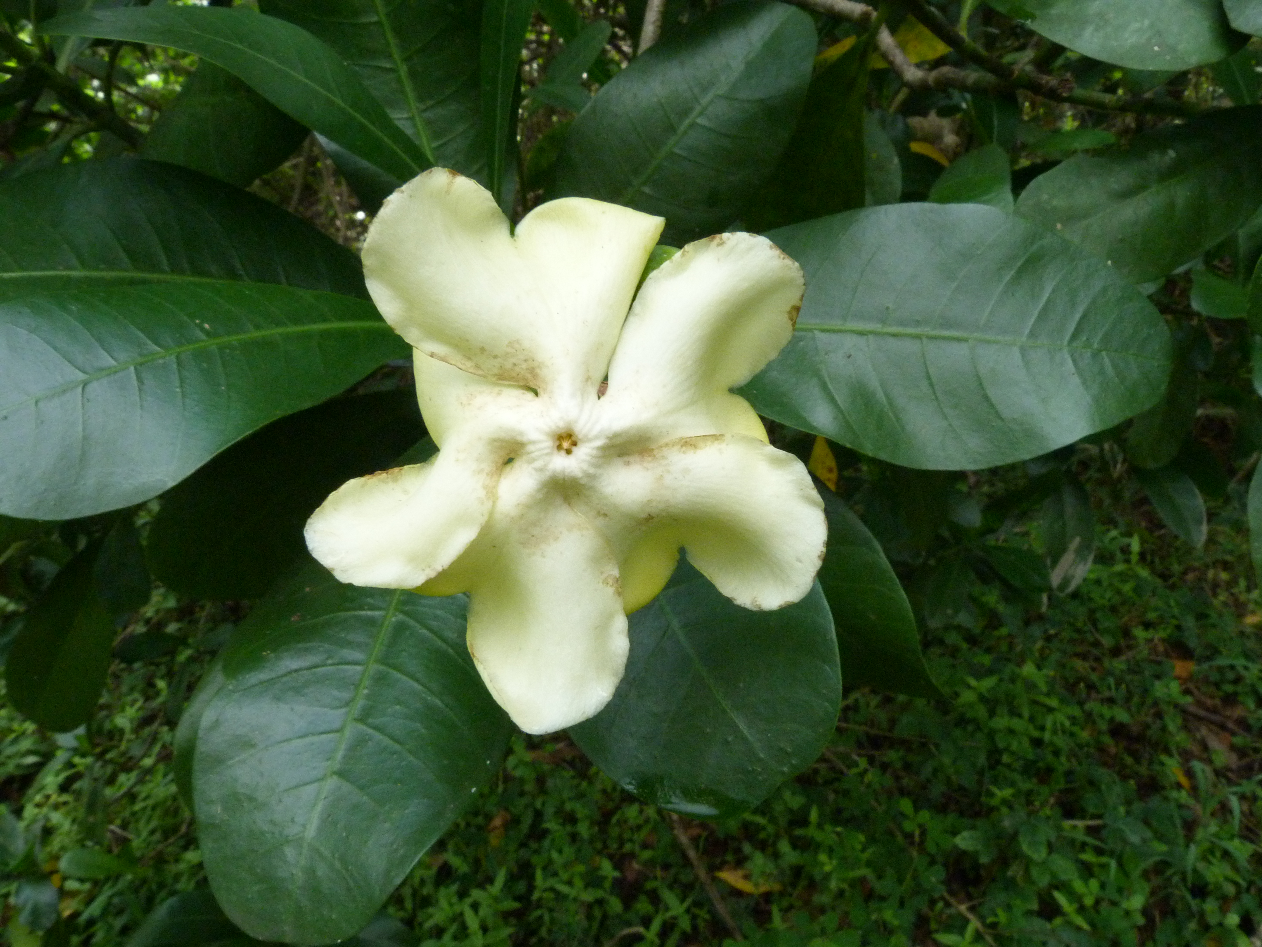 Voacanga thouarsii - Mkuju River, Selous Game Reserve (Tanzania)